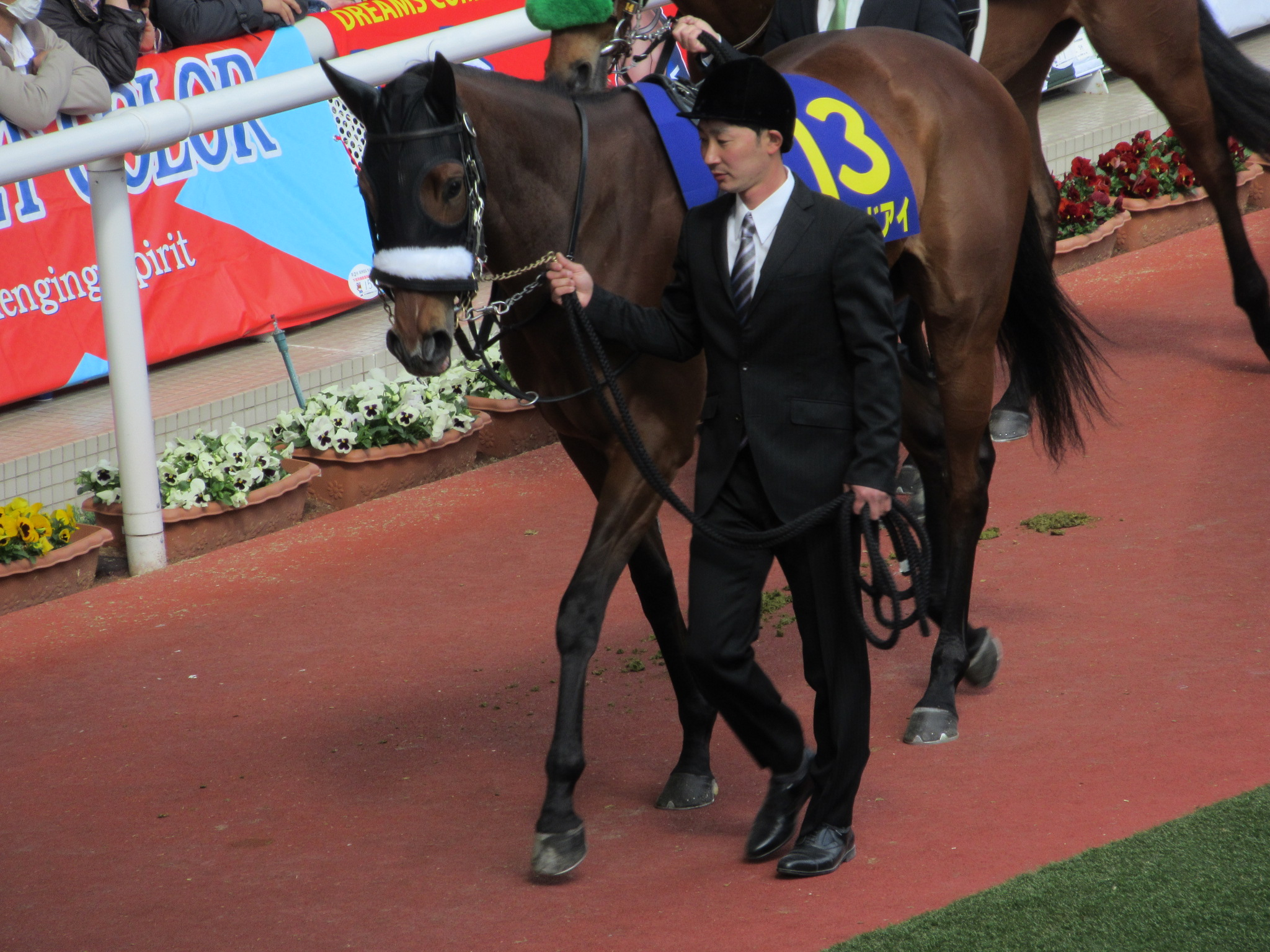 アーモンドアイ号 阪神競馬場 桜花賞パドック